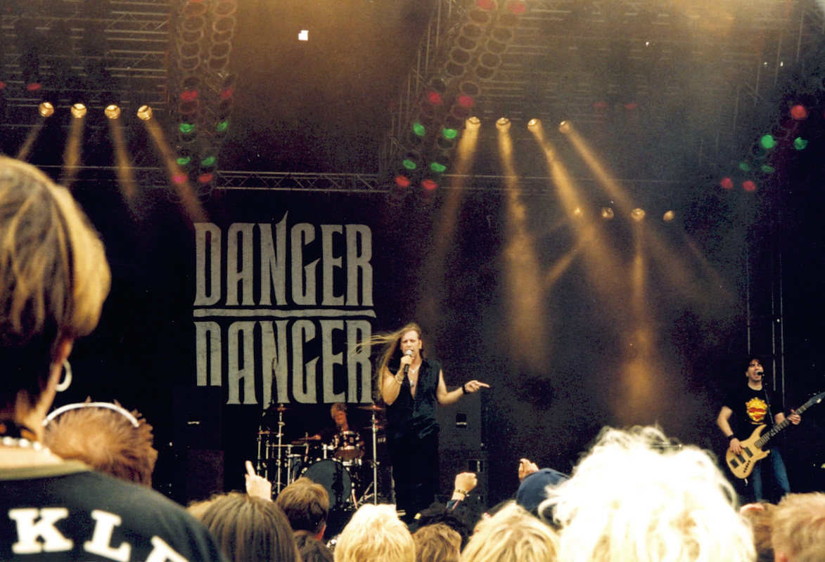 Danger Danger Sweden Rockissa kesäkuussa 2004.